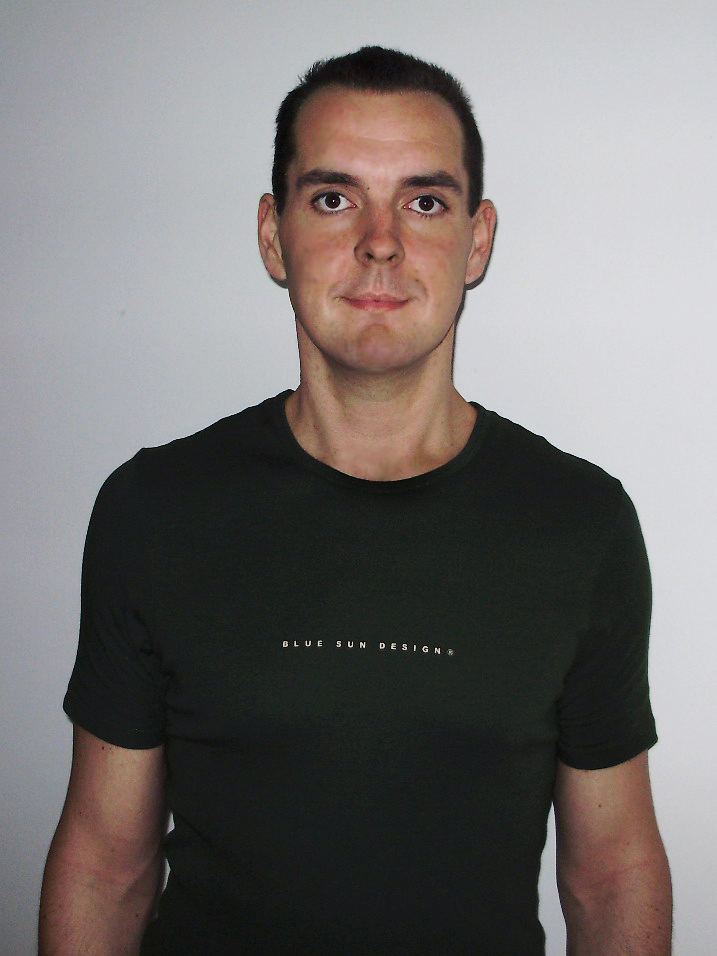 Hrvoje Banaj